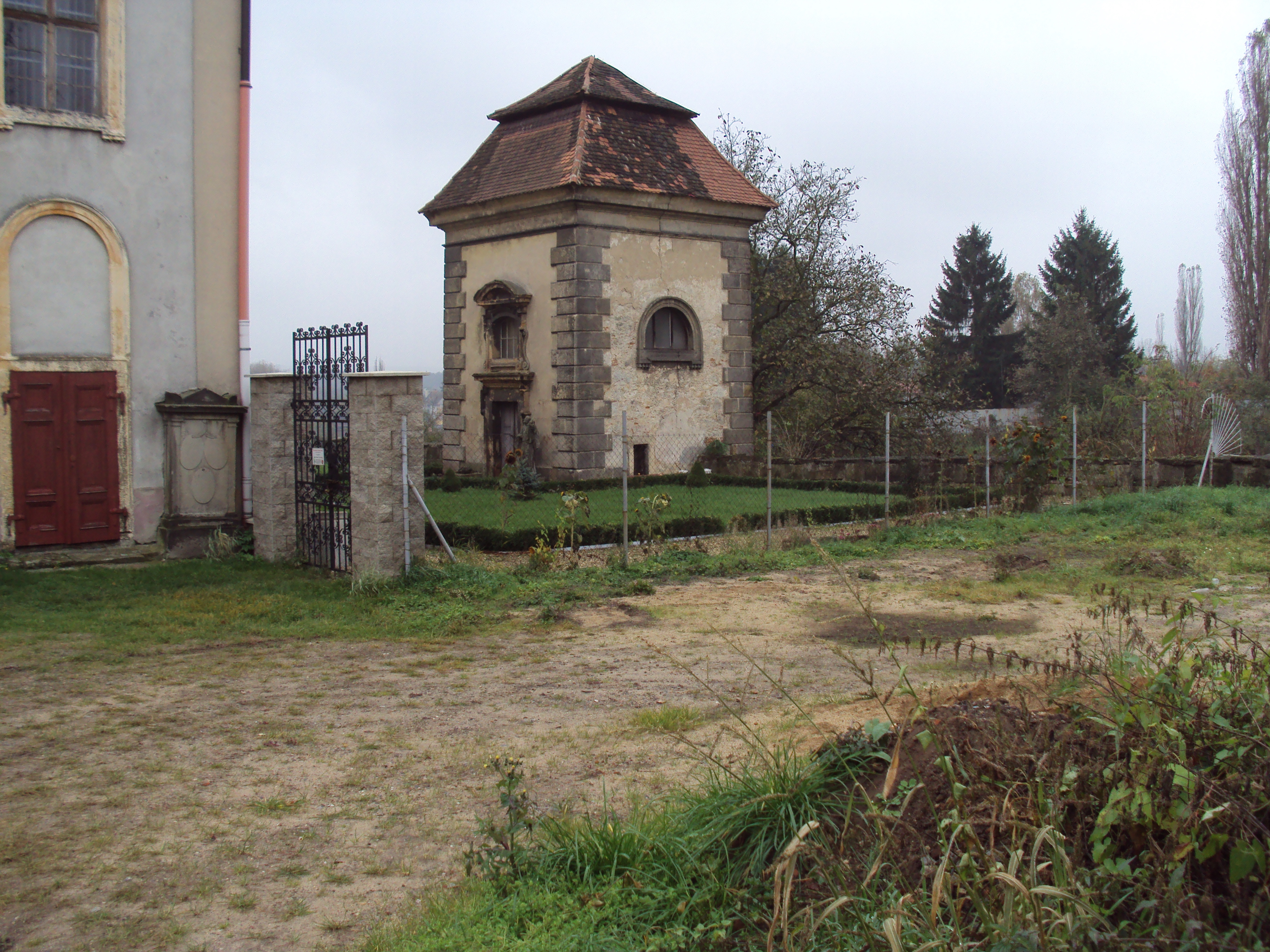 Kaple je v sousedství kostela na konci Mírové ulice v Mimoni